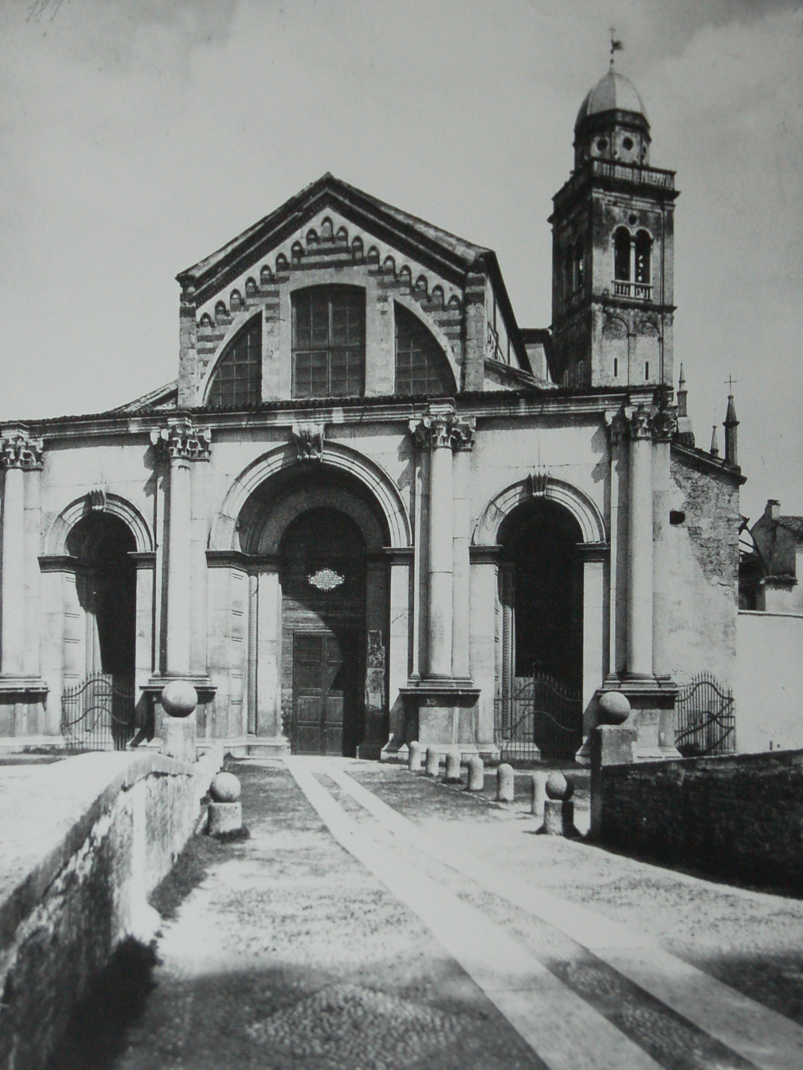 Santa Maria in Organo a Verona. Foto di Moritz Lotze (1809-1890).